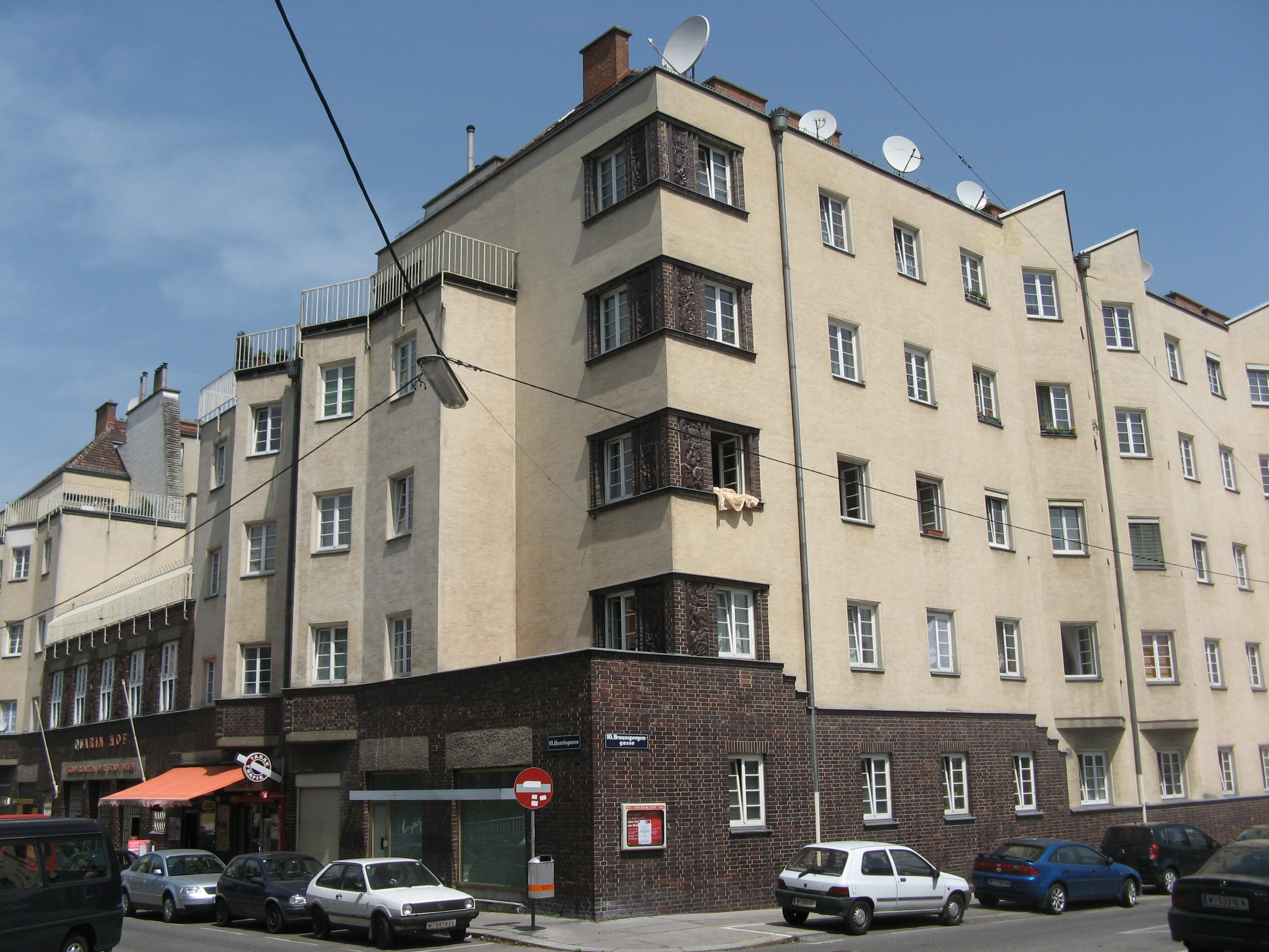 Quarinhof (1924) von Siegfried Theiss und Hans Jaksch, Quaringasse 16, Wien-Favoriten